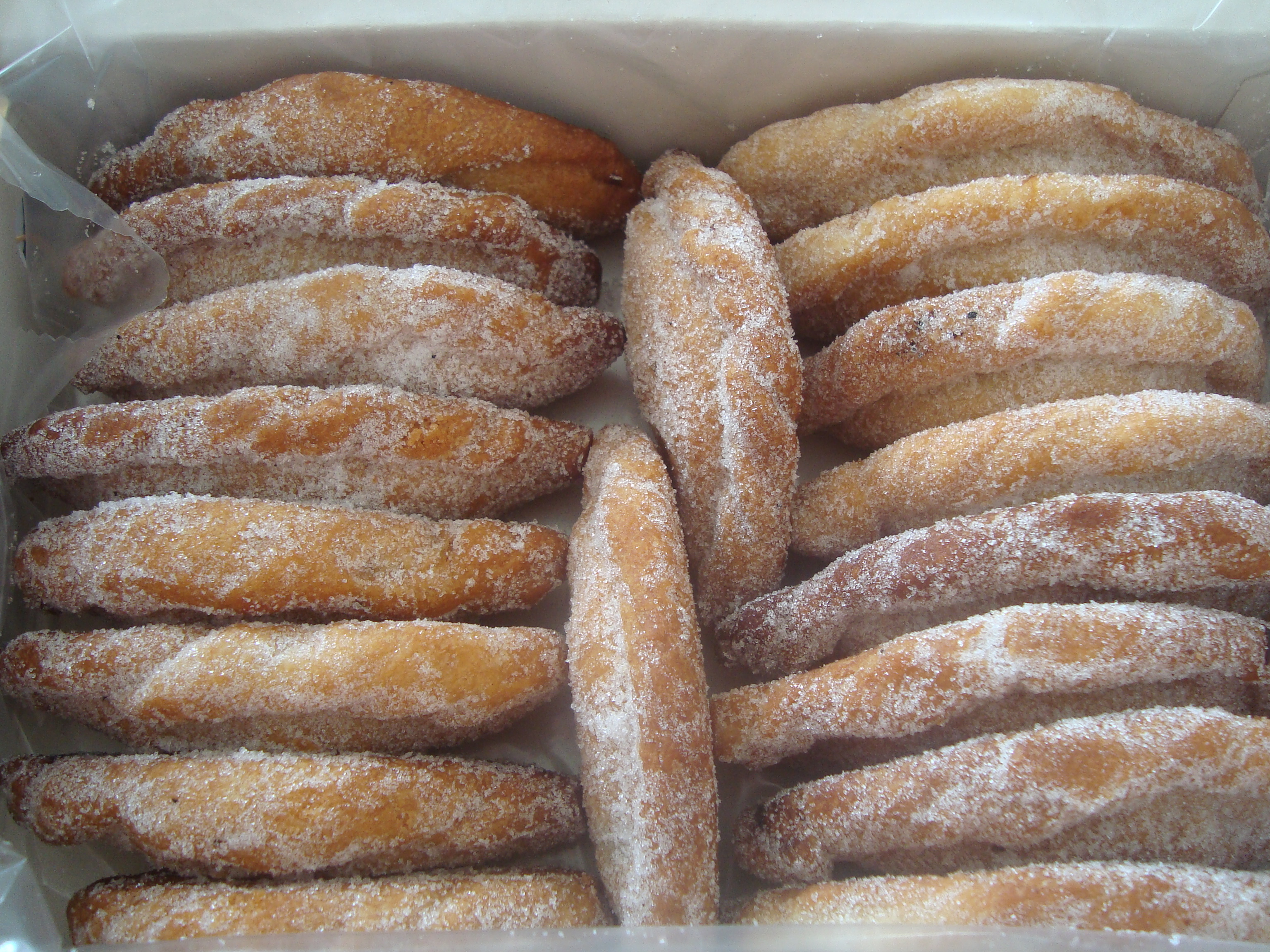 Pastissets, rebosteria de les Terres de l'Ebre.